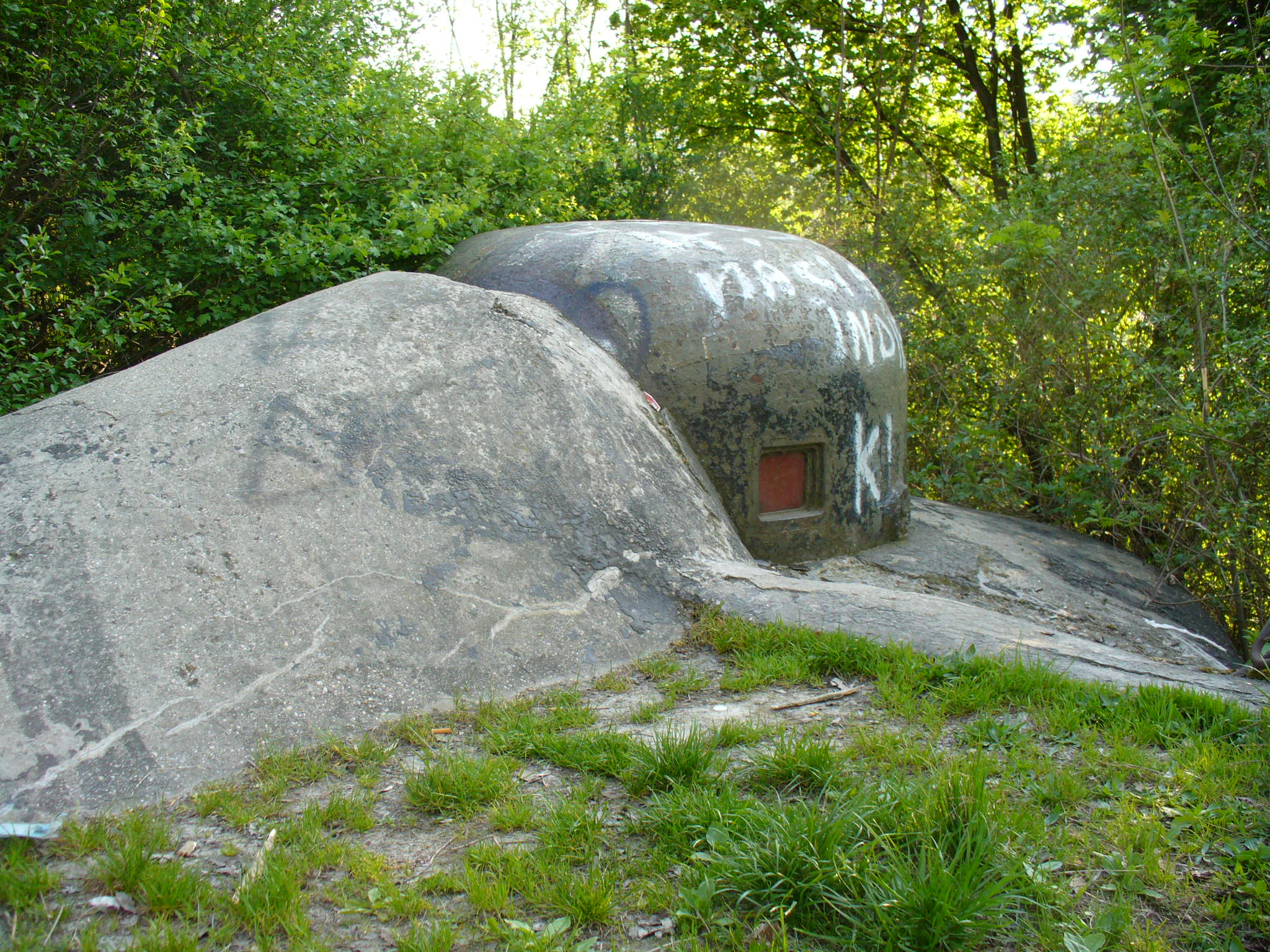 Bunker of former Czechoslovak defense line near Petržalka.